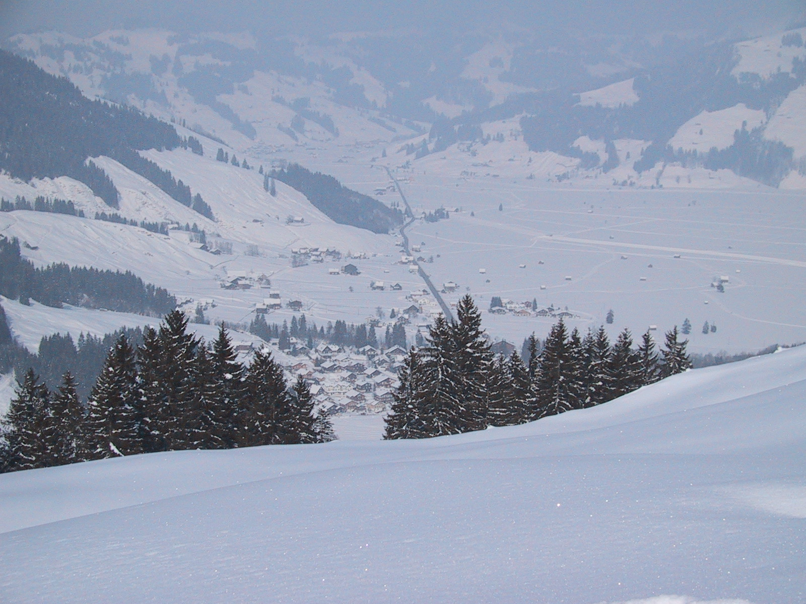 Blick auf Unteriberg, aufgenommen von Oberiberg